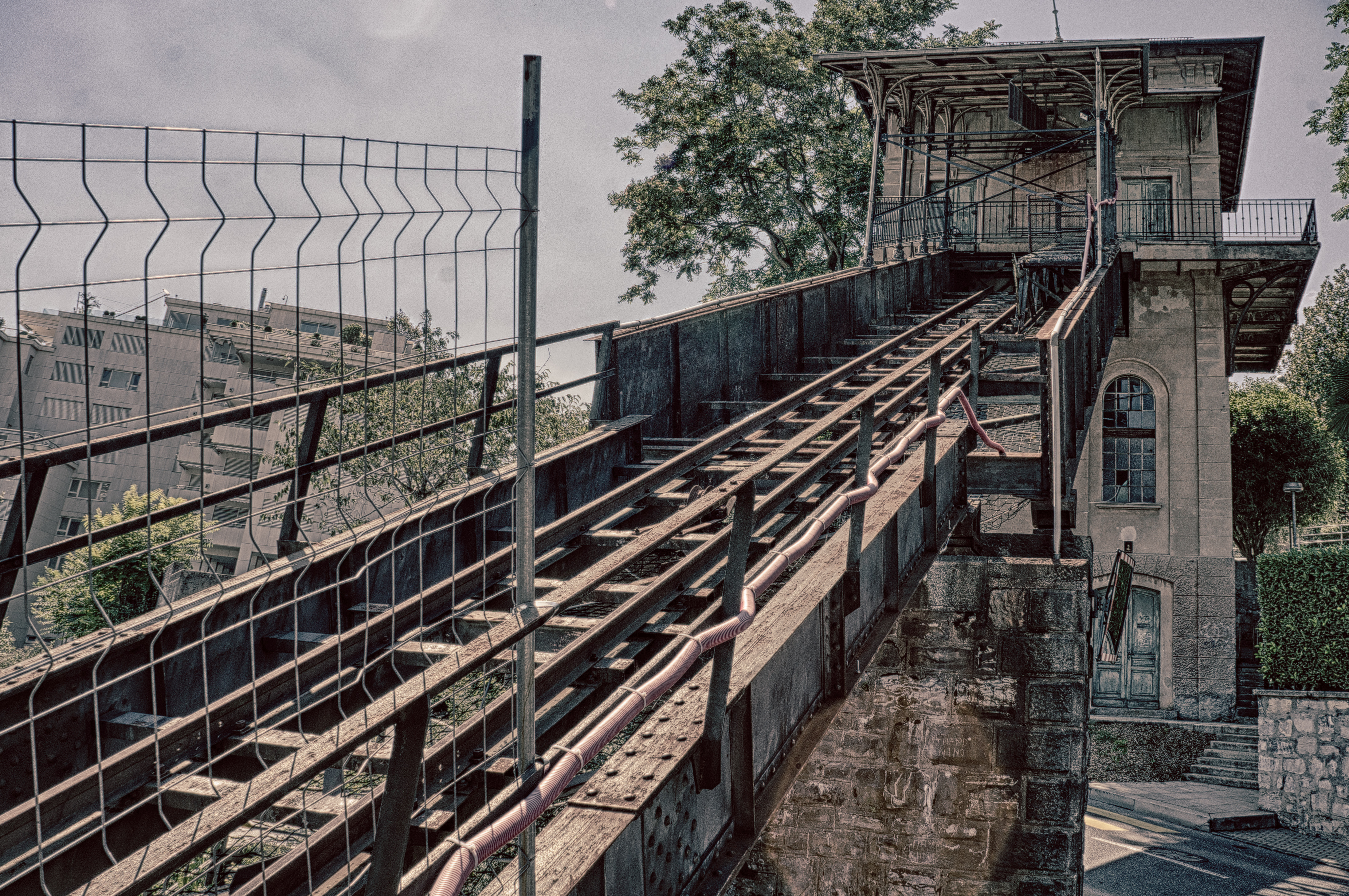 Funicolare degli Angioli